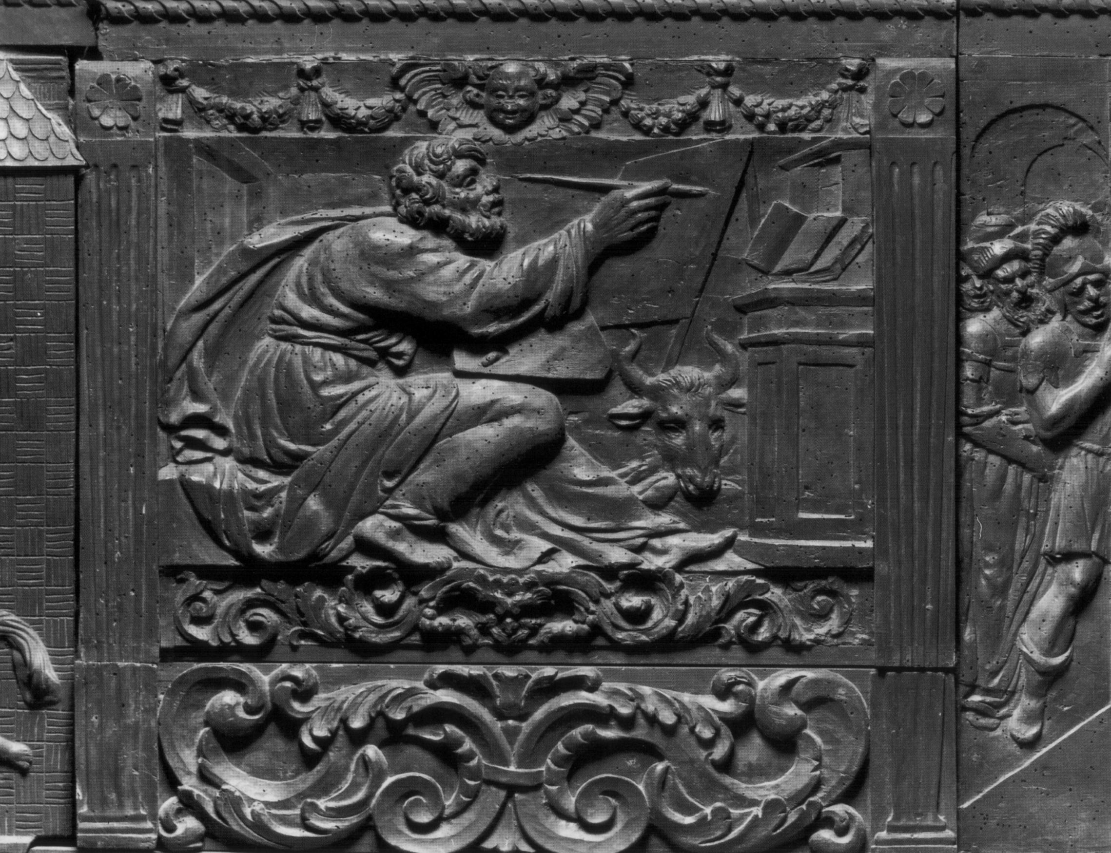 Il Pulpito della Resurrezione, in San Lorenzo a Firenze, opera di Donatello (1460s). Dettaglio: San Luca, pannello aggiunto nel XVII secolo. - Fotografia Alinari, 1852.